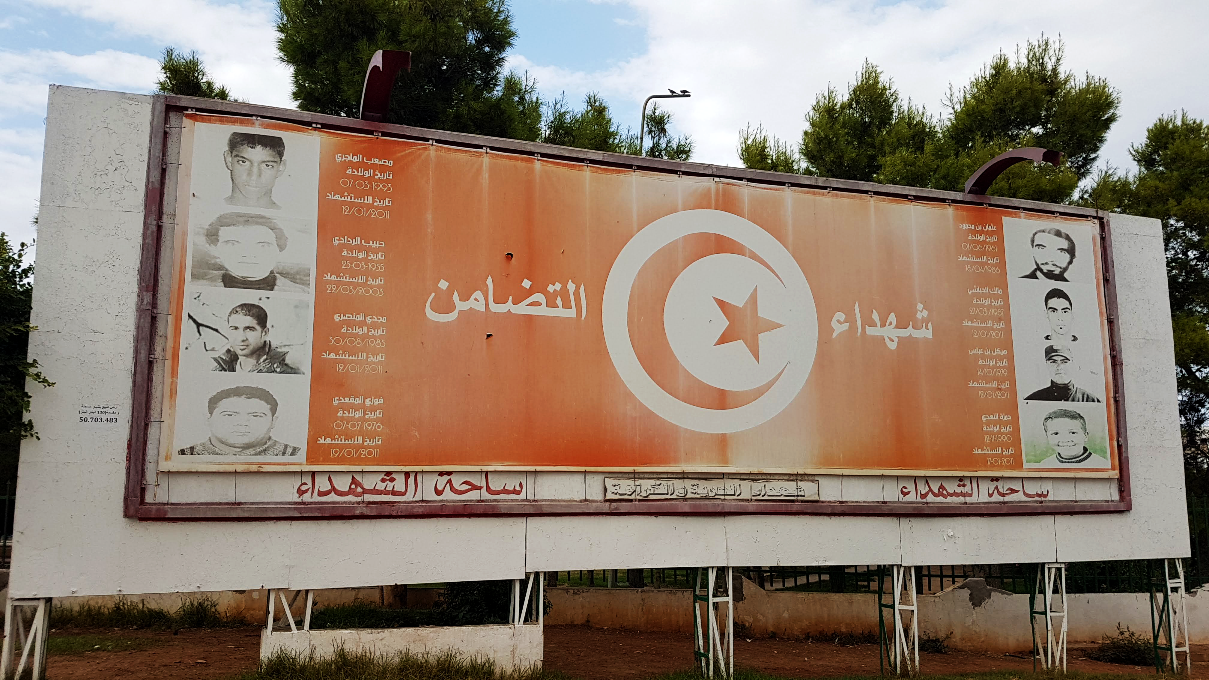 Place des martyrs cite ettdhamen